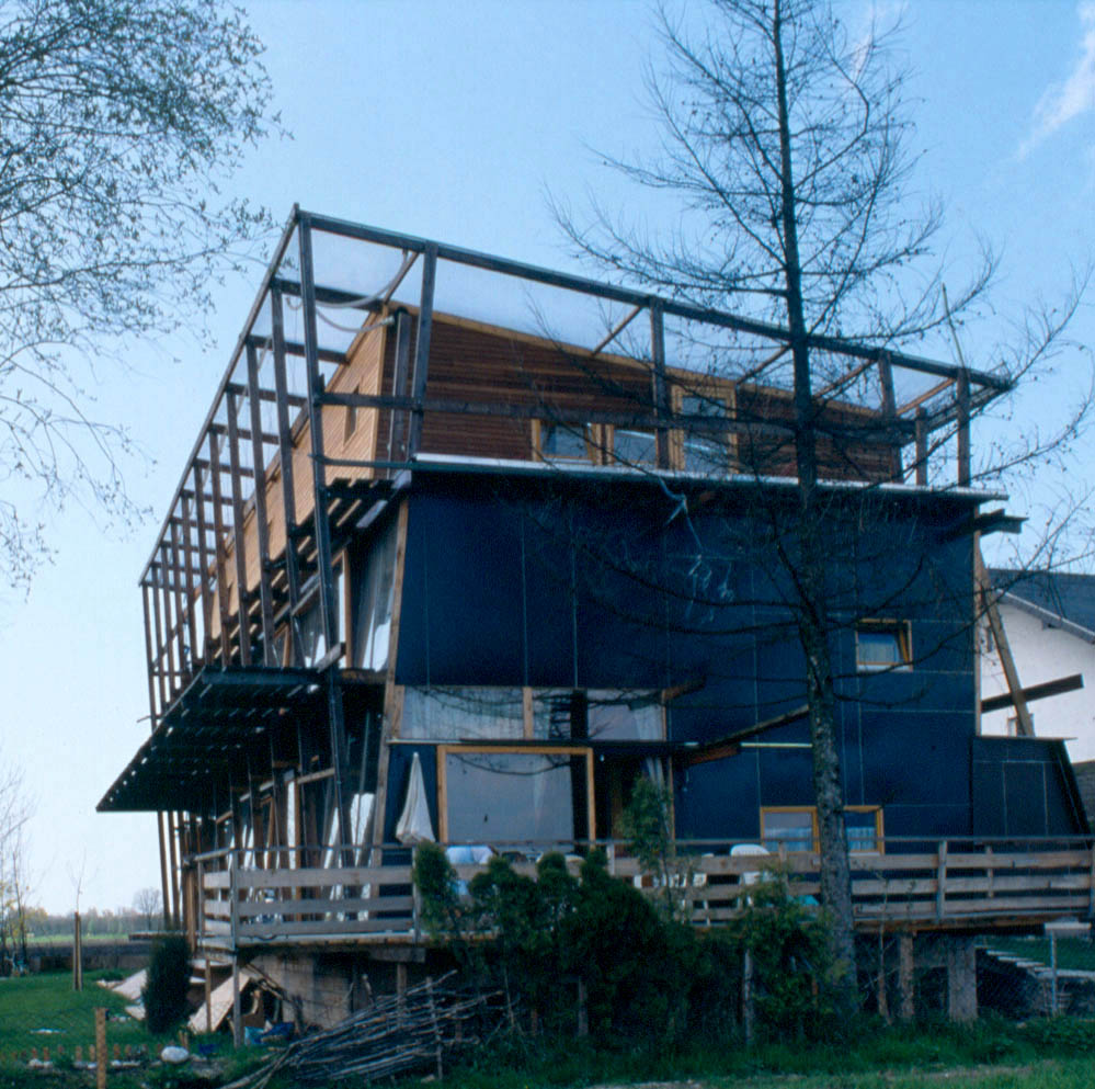 maxRieder work.